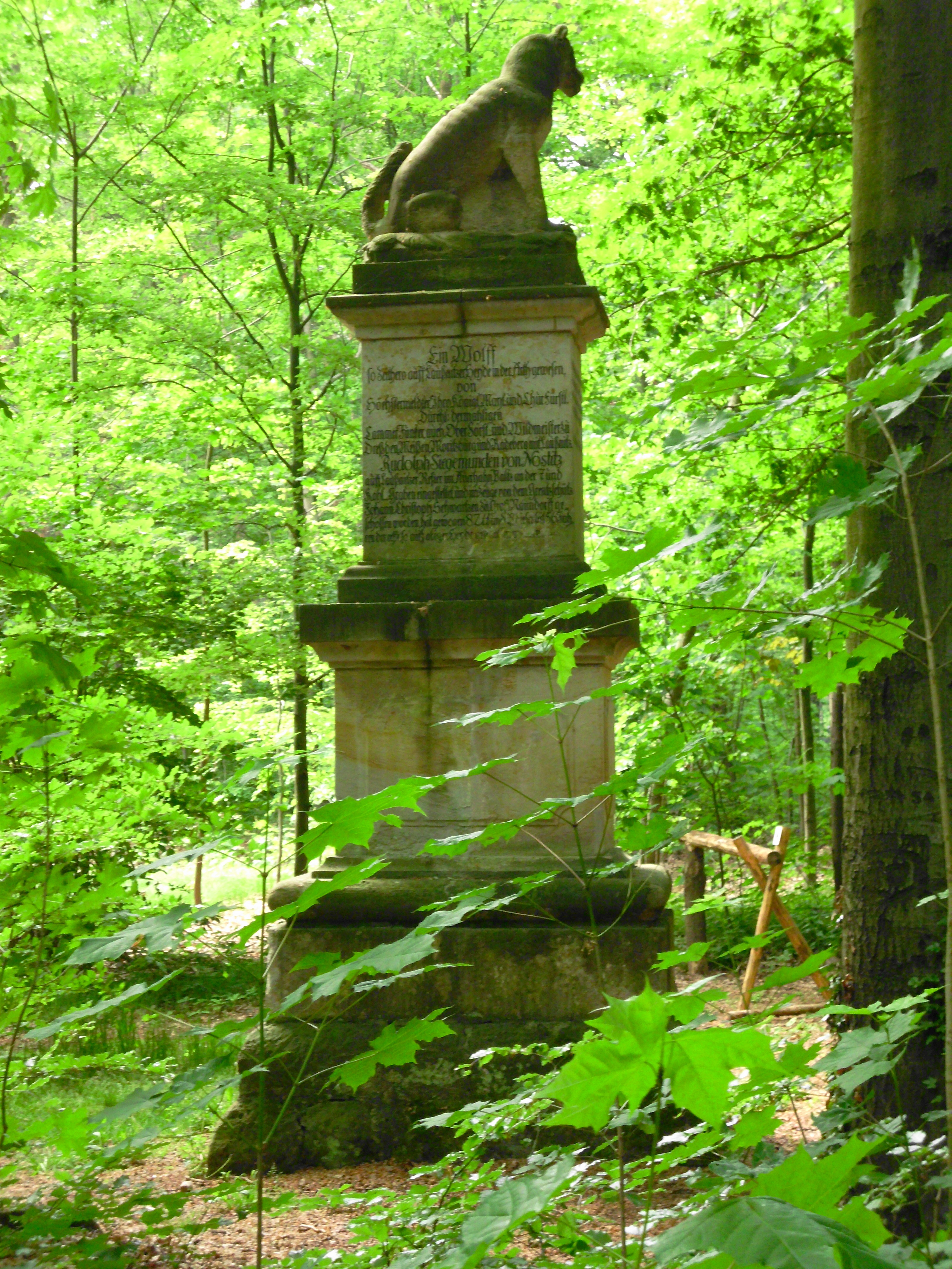 Wolfsmonument an der Straße zwischen Laußnitz und Ottendorf-Okrilla. Sandstein, 5 m hoch.